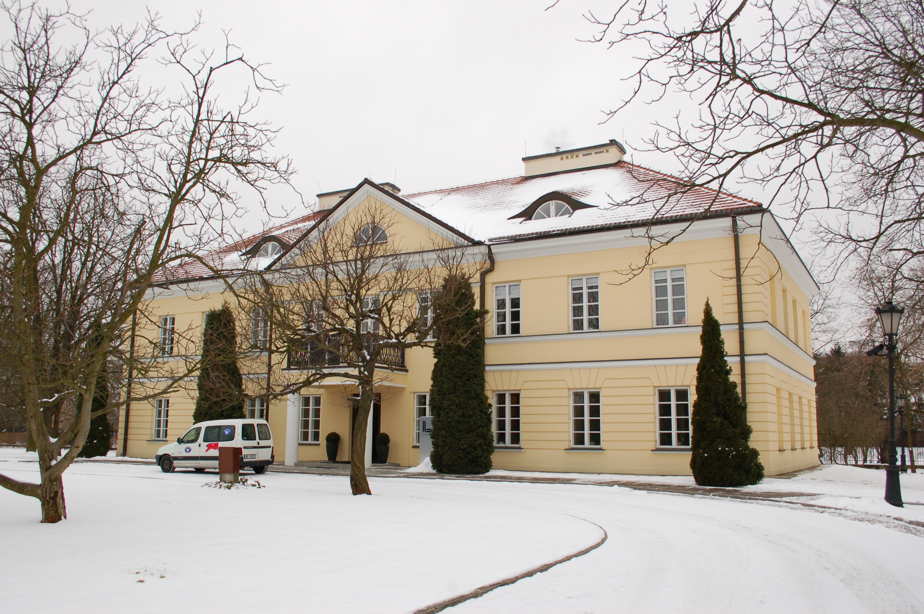 Palace ensemble Sielce, palace